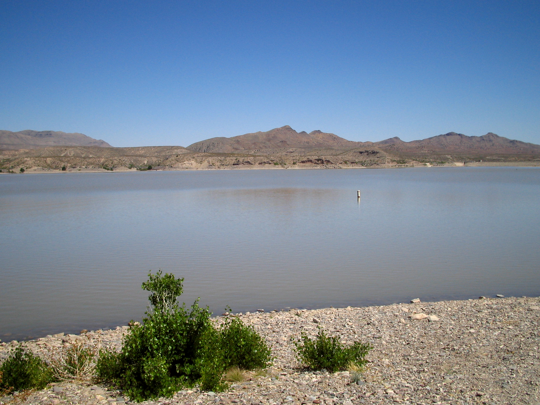 Caballo Lake, Caballo, NM